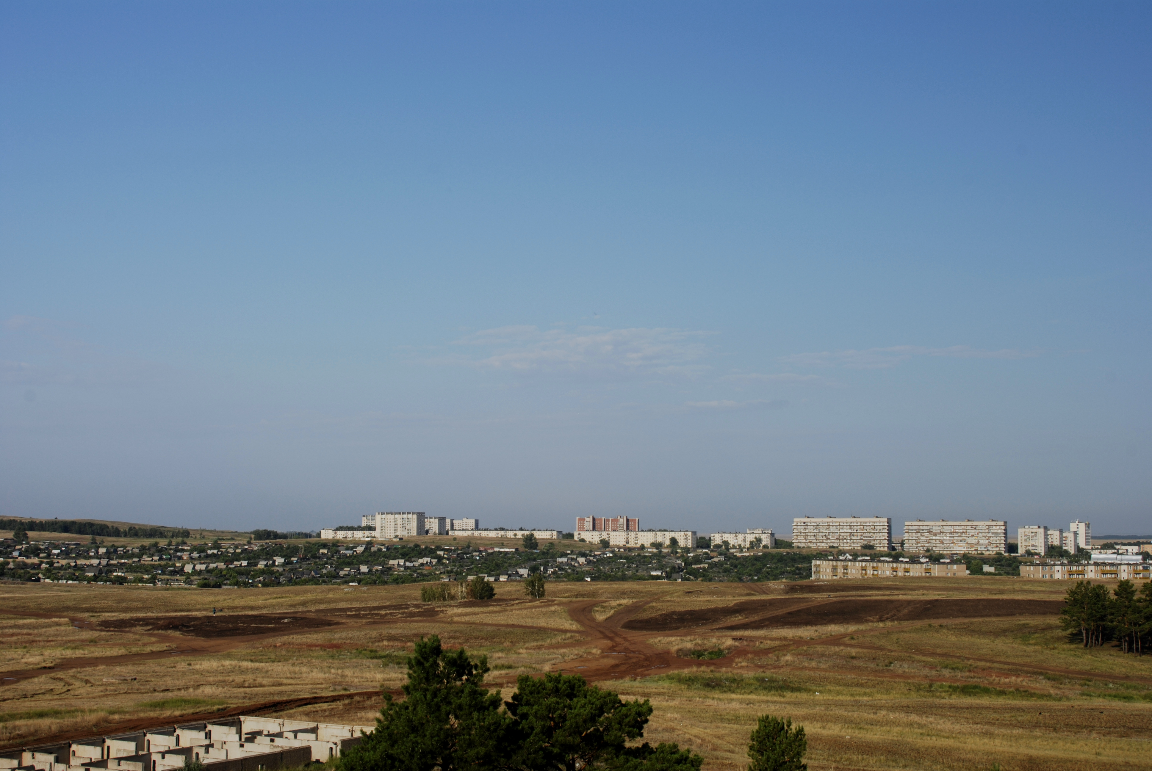 Степногорск, панорама